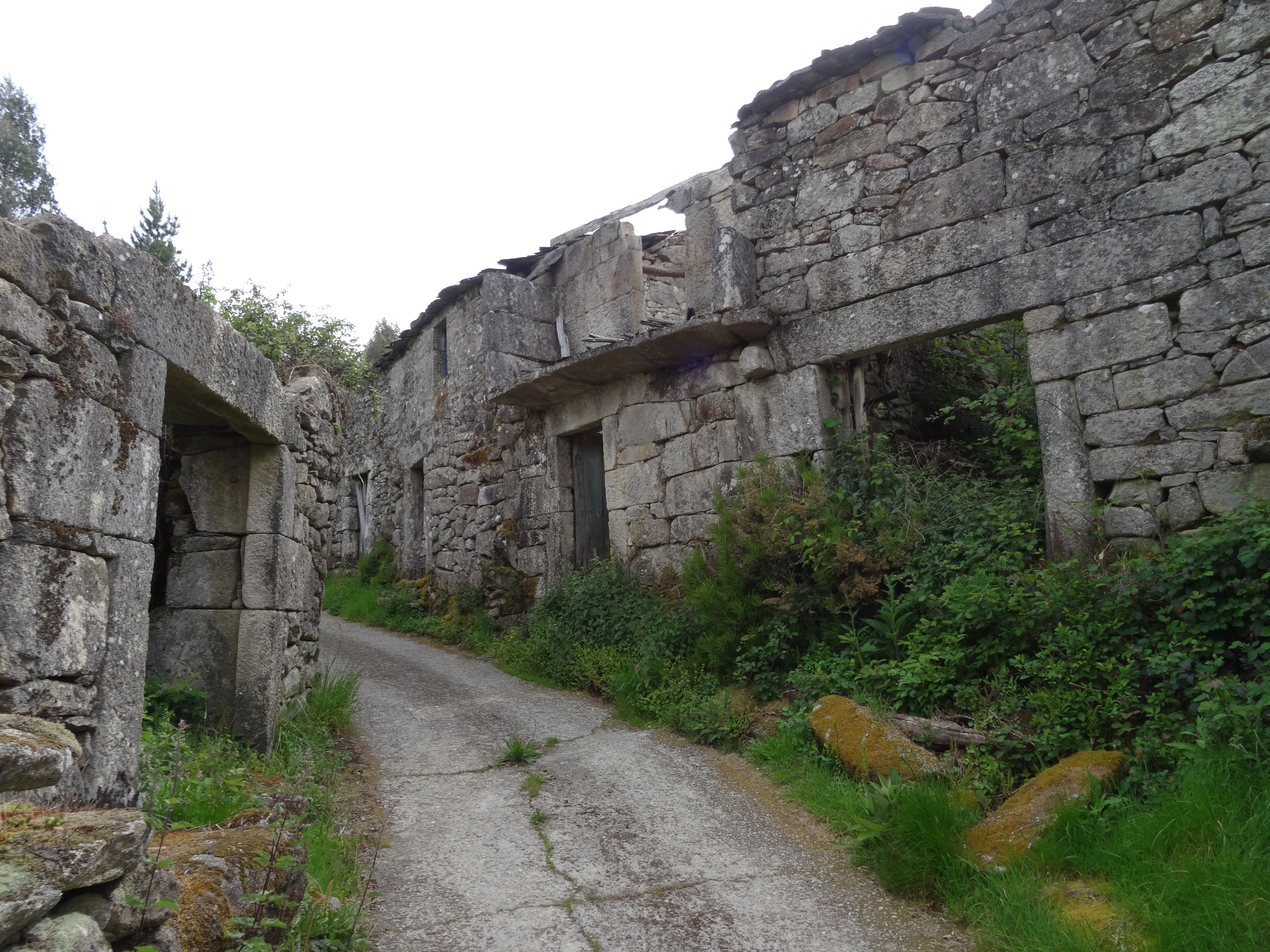 Ver título.